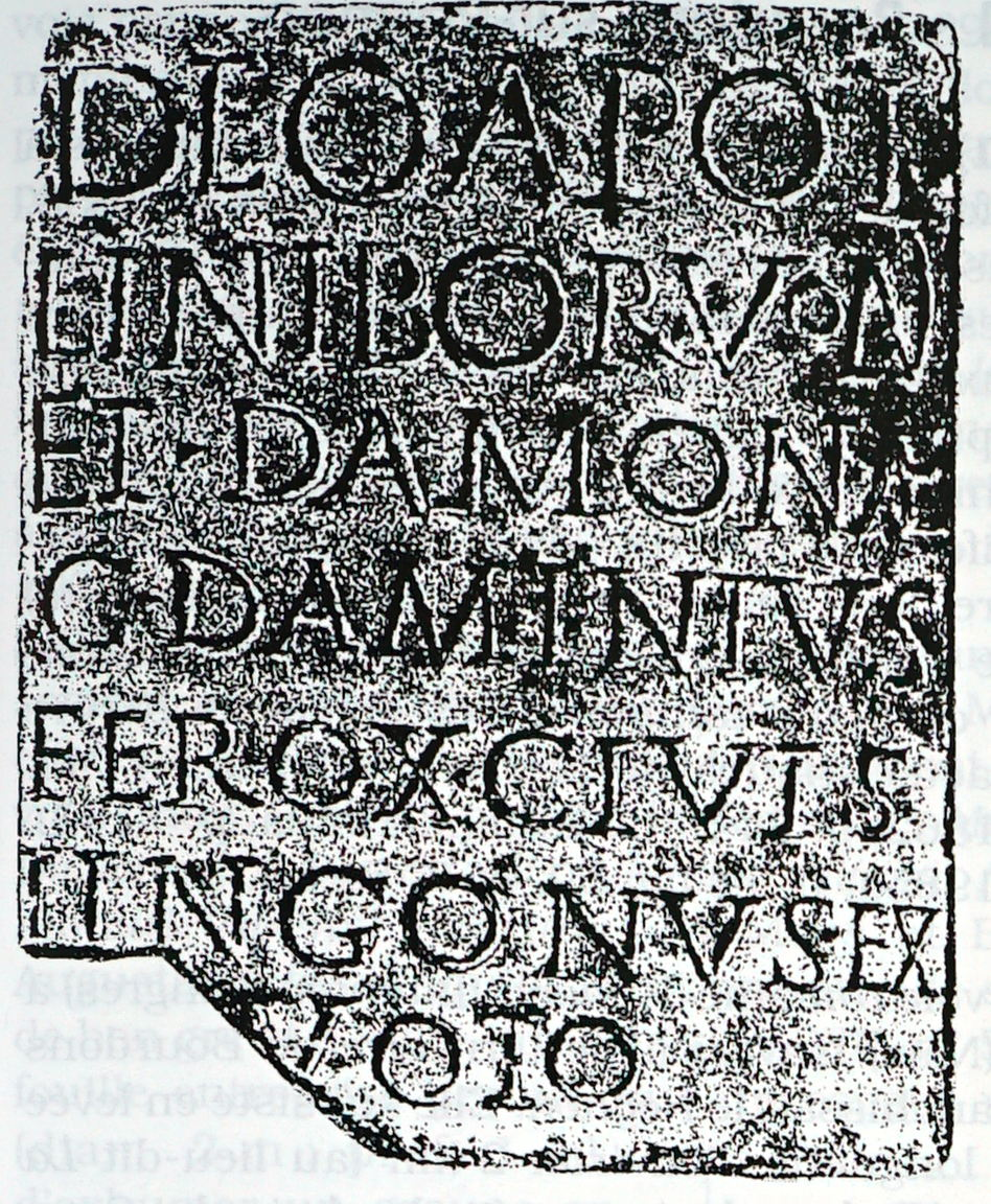 vue de cf. titre